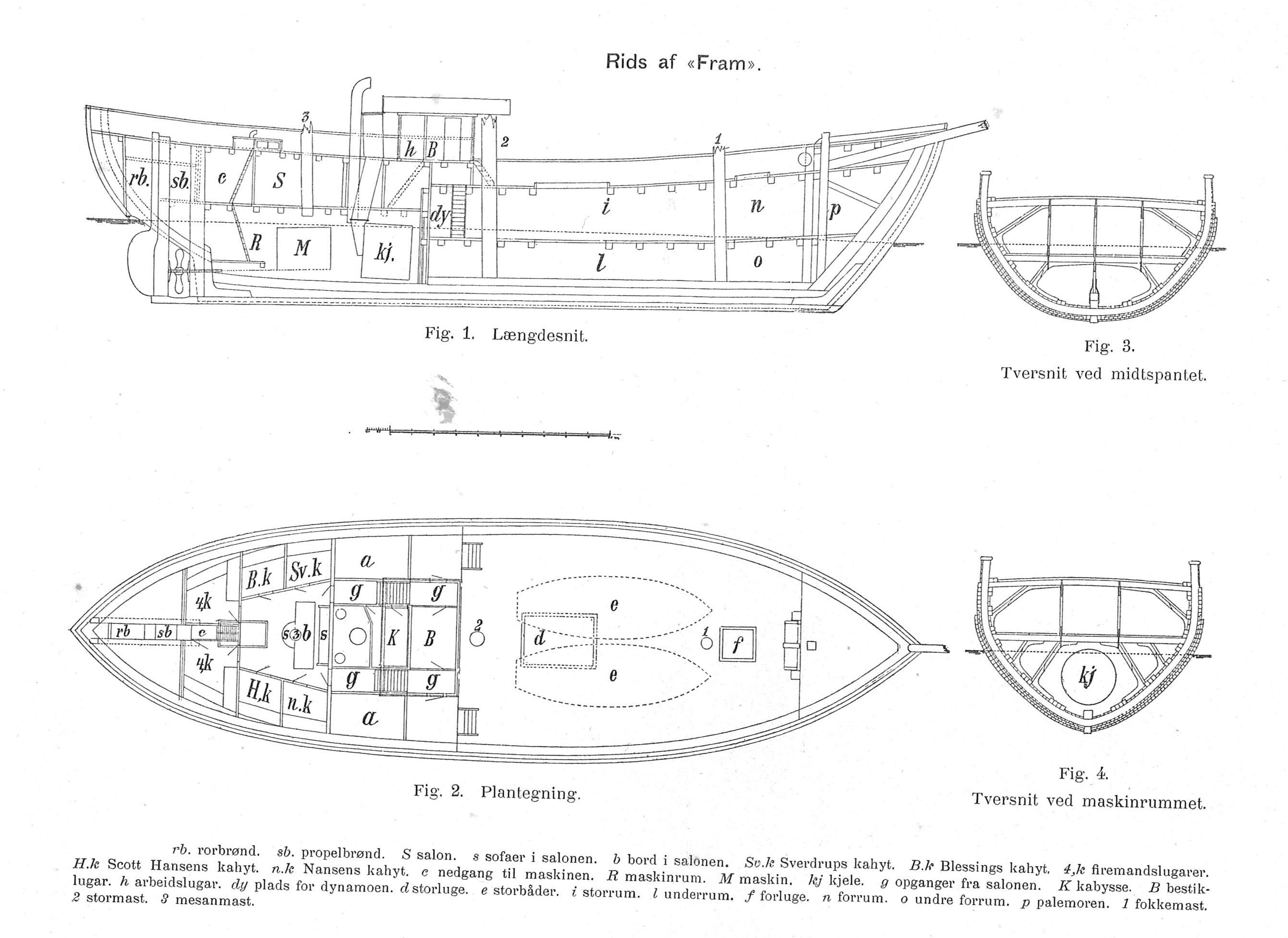 Teikning av polarskipet «Fram» - i Fram over Polhavet av Fridtjof Nansen